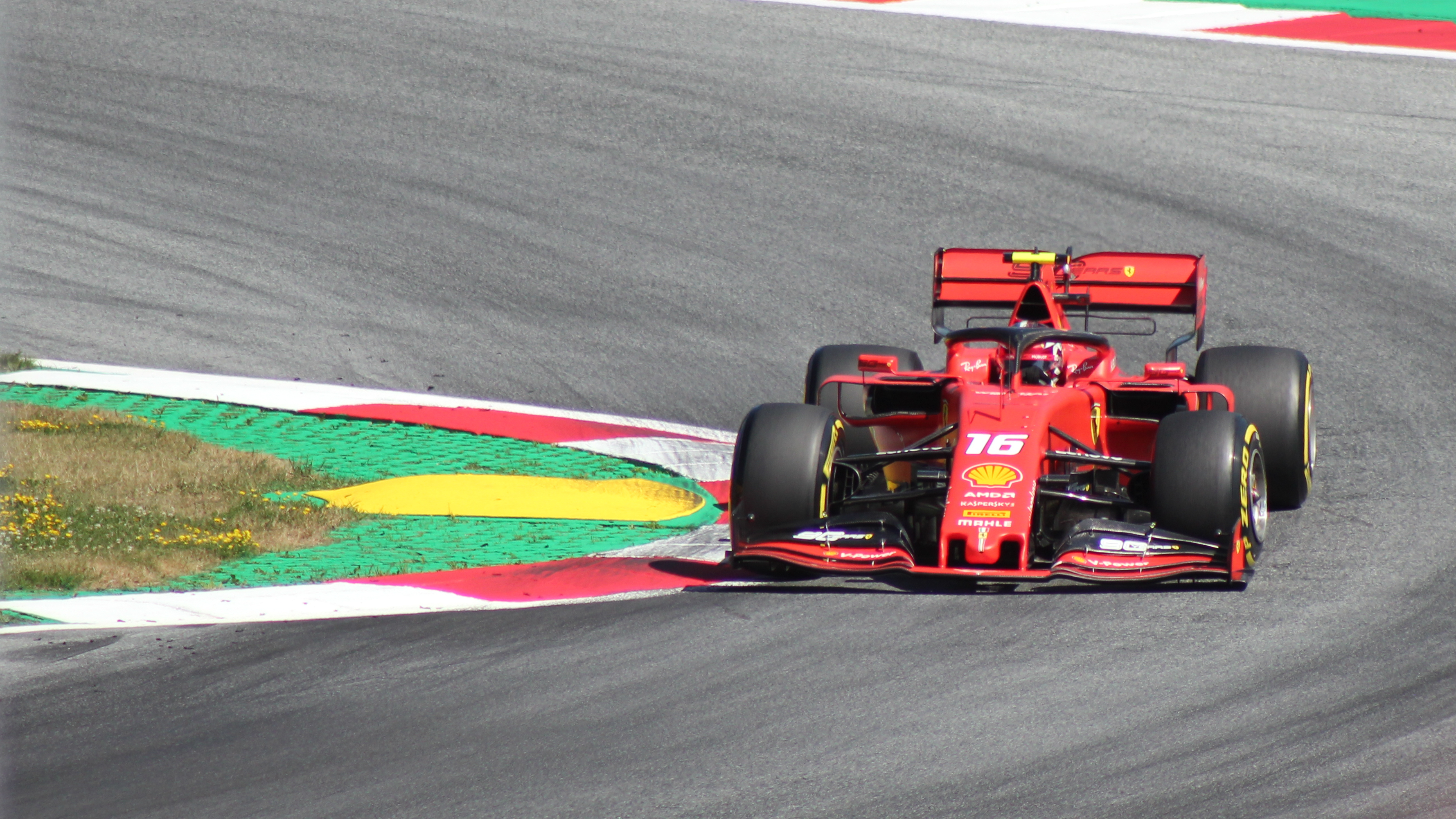 Leclerc beim Rennwochenende in Österreich 2019